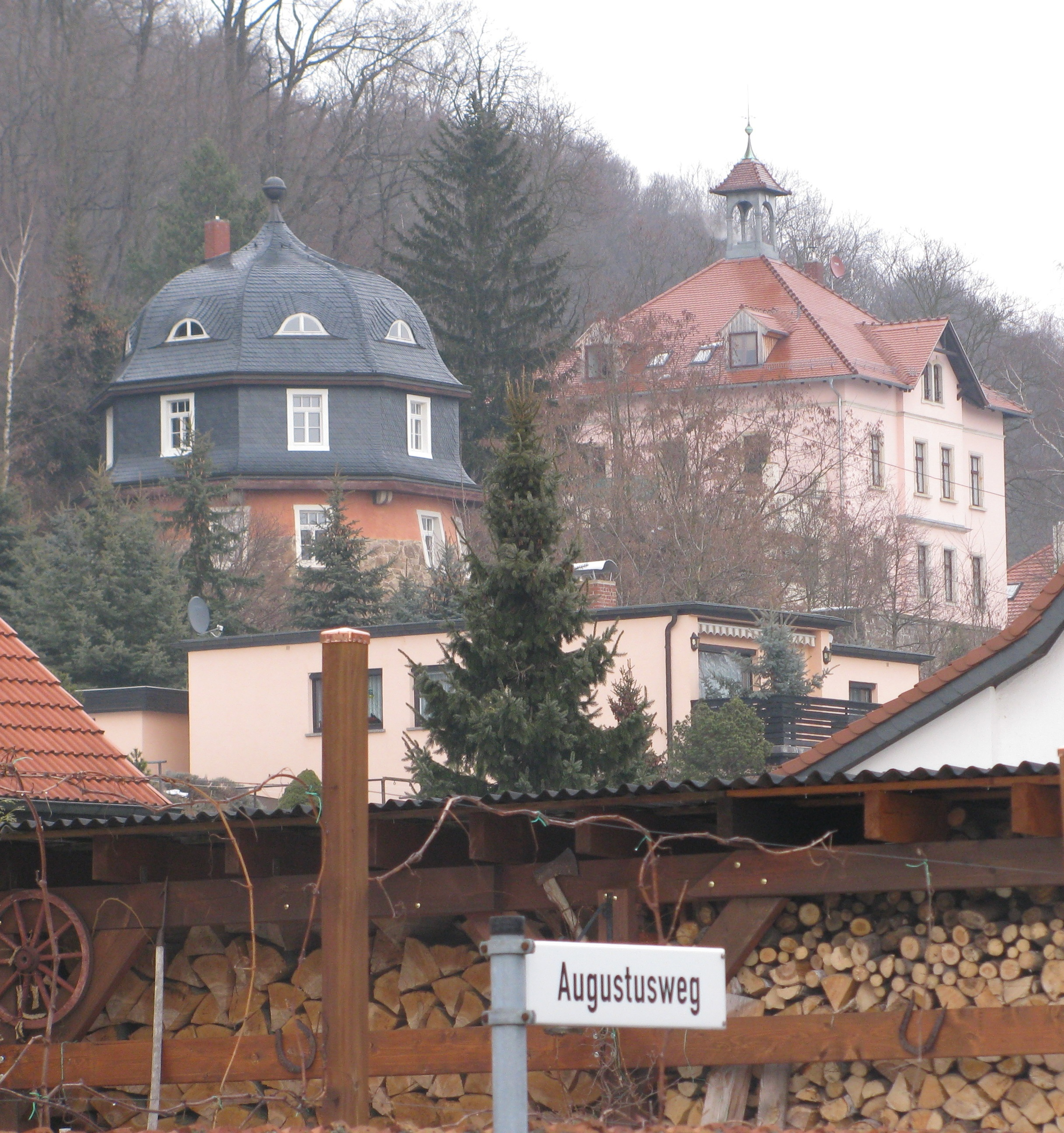 Rundhaus (links) und Villa Hellmund am Augustusweg, Radebeul